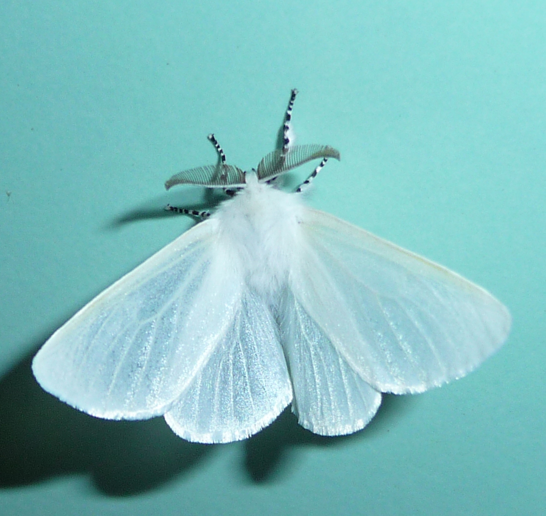 Picture taken near Verdun, France